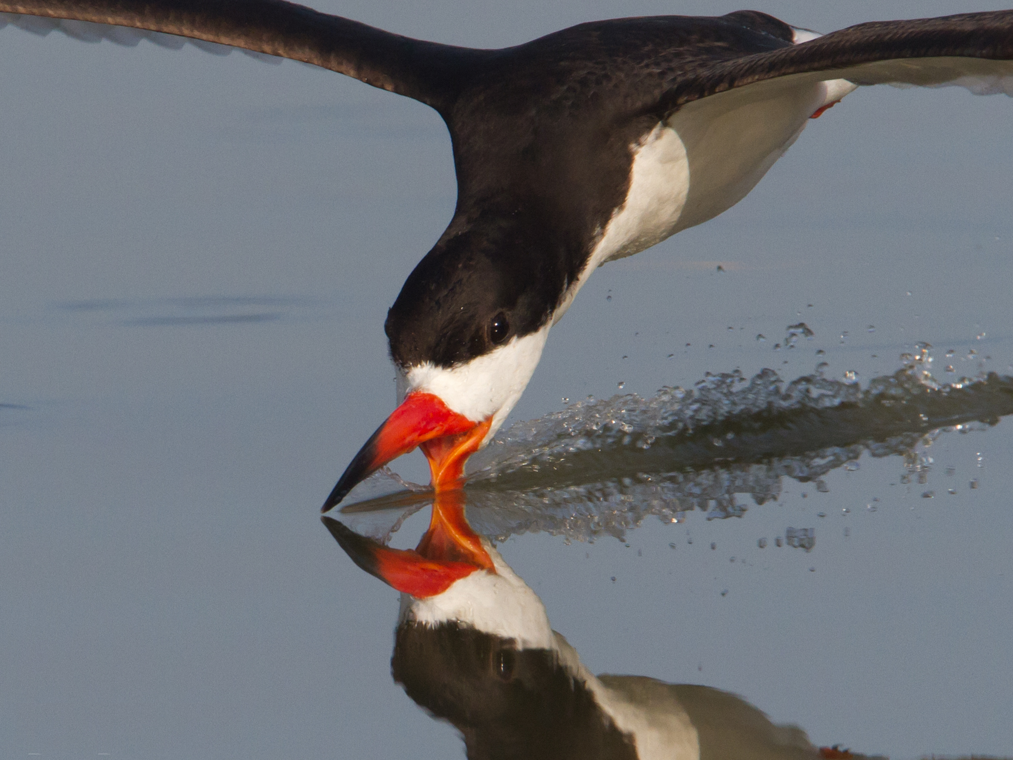 Black Skimmer